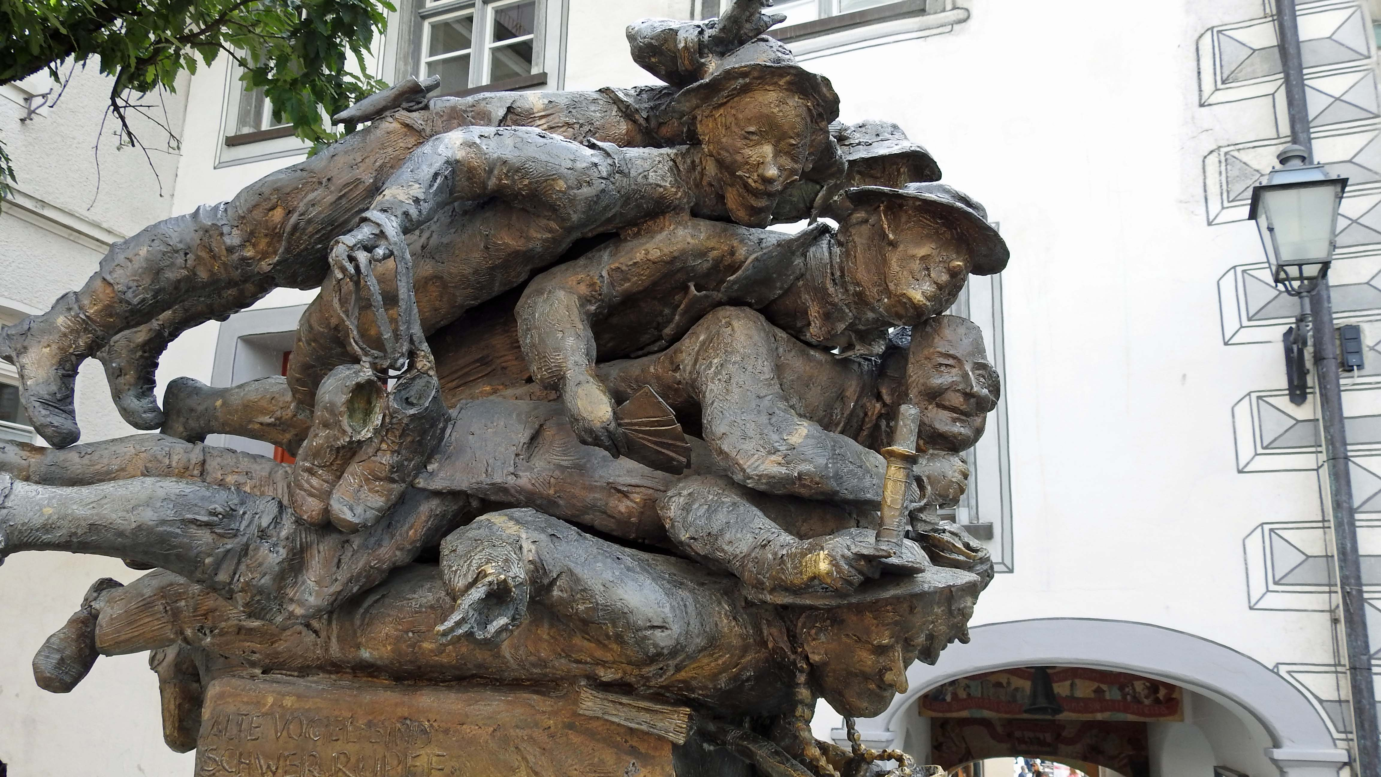 Die verdruckten Allgäuer in Wangen im Allgäu